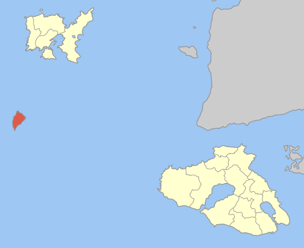 Locator map of Agios Efstratios community (Δήμος Κοινότητα Αγίου Ευστρατίου) in Lesbos prefecture (Νομός Λέσβου) in Greece.